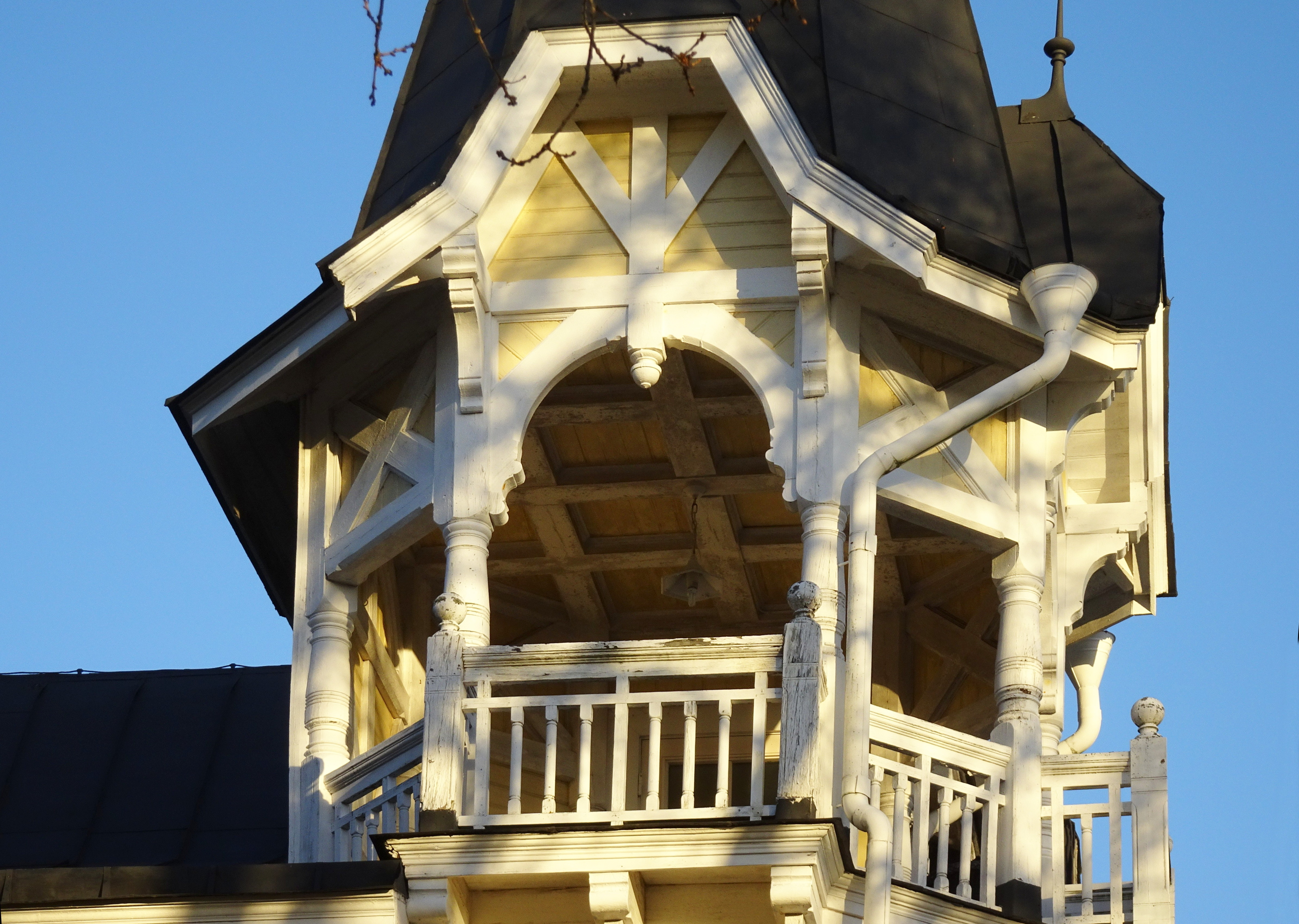 Villa Amalfi i Saltsjöbaden, byggd 1892, arkitekt Edward Ohlsson